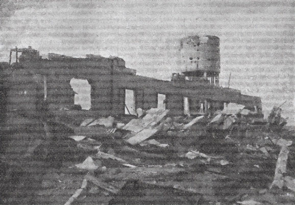 הריסות קיבוץ בארות יצחק בנגב, שנהרס במלחמת השחרור.